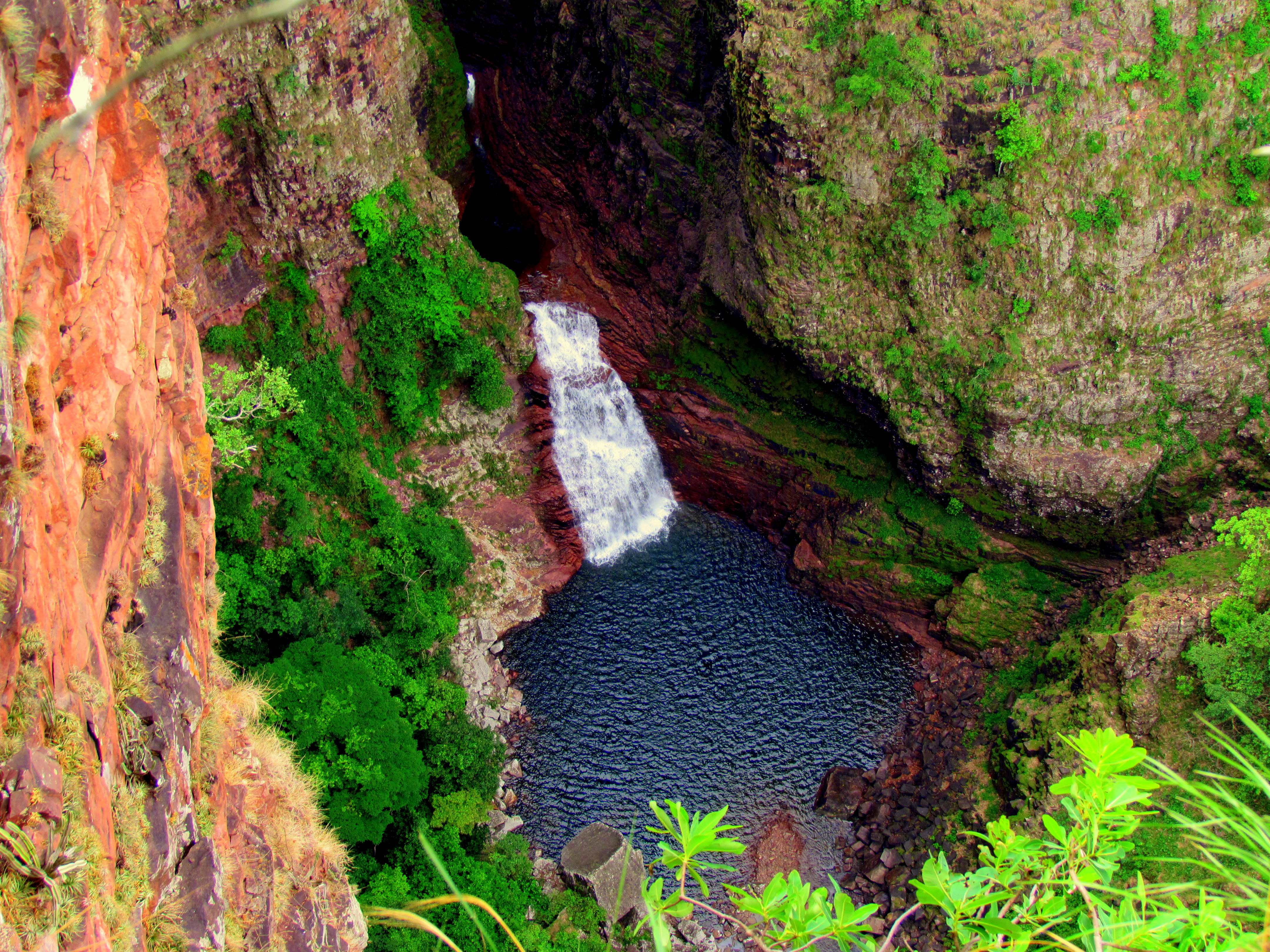 Parte alta do parque, cachoeira onde é possível, visualizar falcões caçando andorinhões e morcegos.